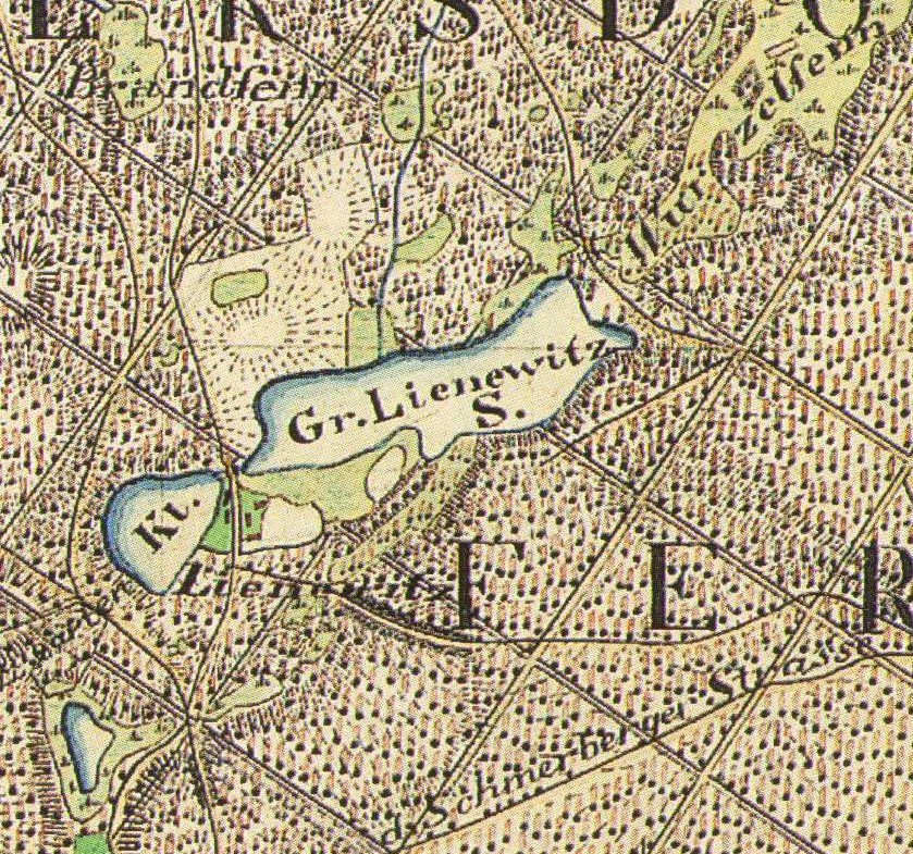 Lienewitz, Michendorf, Brandenburg, Deutschland, Urmesstischblatt Blatt Werder (Havel), 3643, von 1839